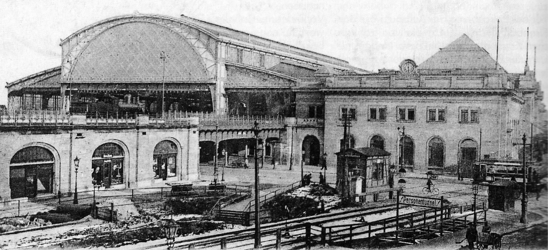 Interimsbahnhof vor dem im Bau befindlichen Bahnhof Dresden-Neustadt